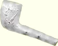 Goudsche stenen pijpenkop, scan van oude 6x9cm zw/wt (familie)foto, waarna bewerkt in progr. Categorie:Tabak